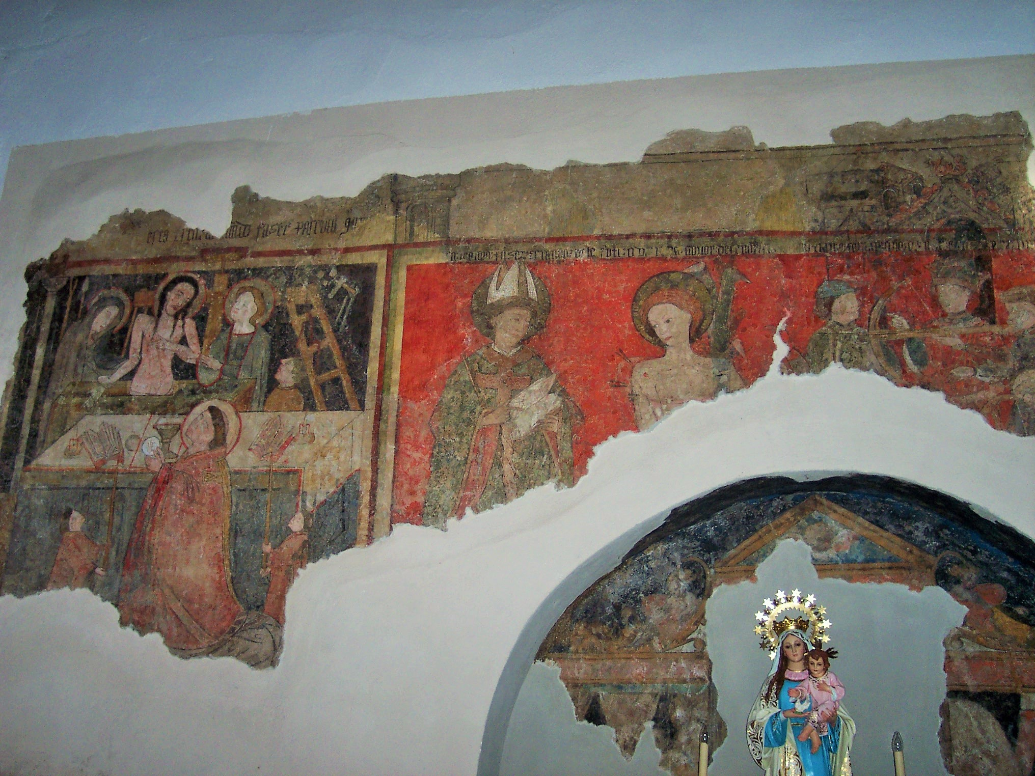 Pinturas murales 1 iglesia santiago-Capilla-Badajoz